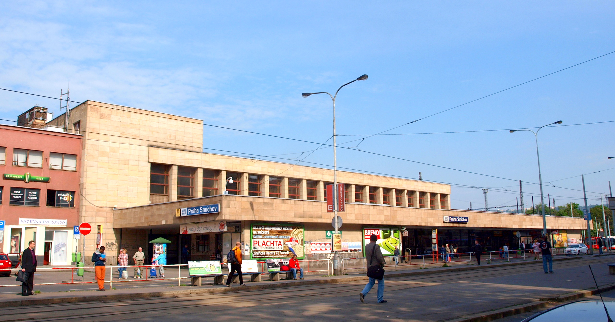 Nádraží ČD, Praha-Smíchov